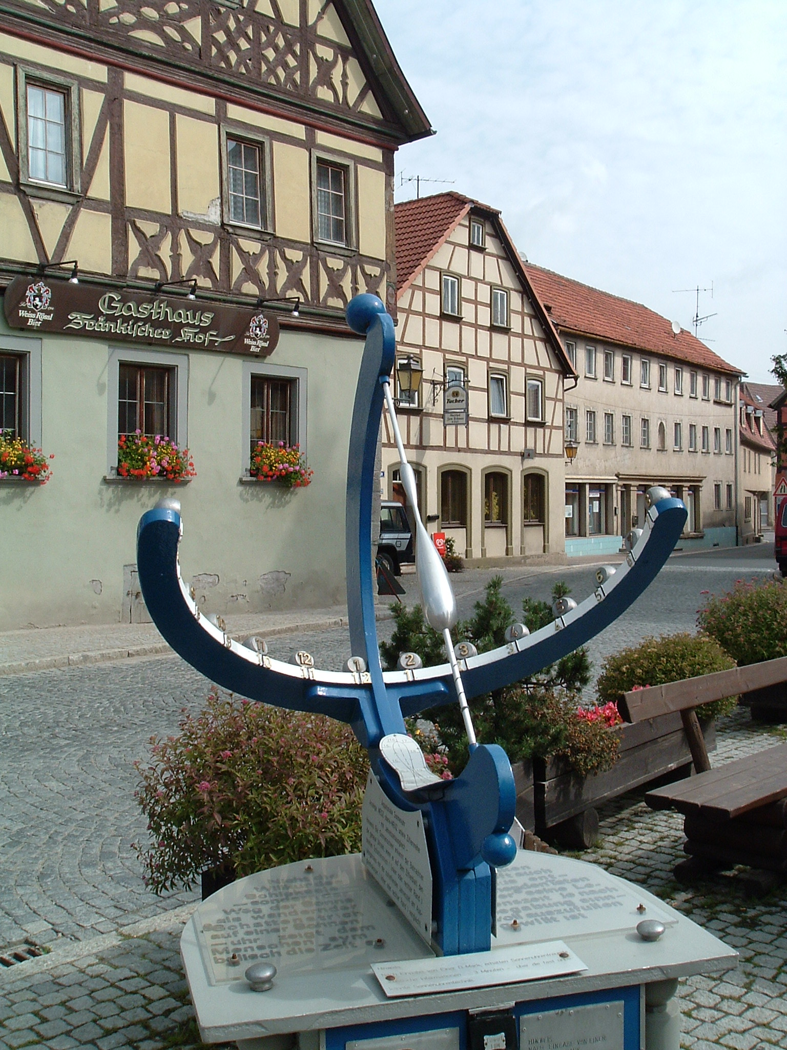 Photo personnelle. Juillet 2004